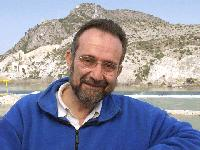 El profesor Pedro Arrojo.